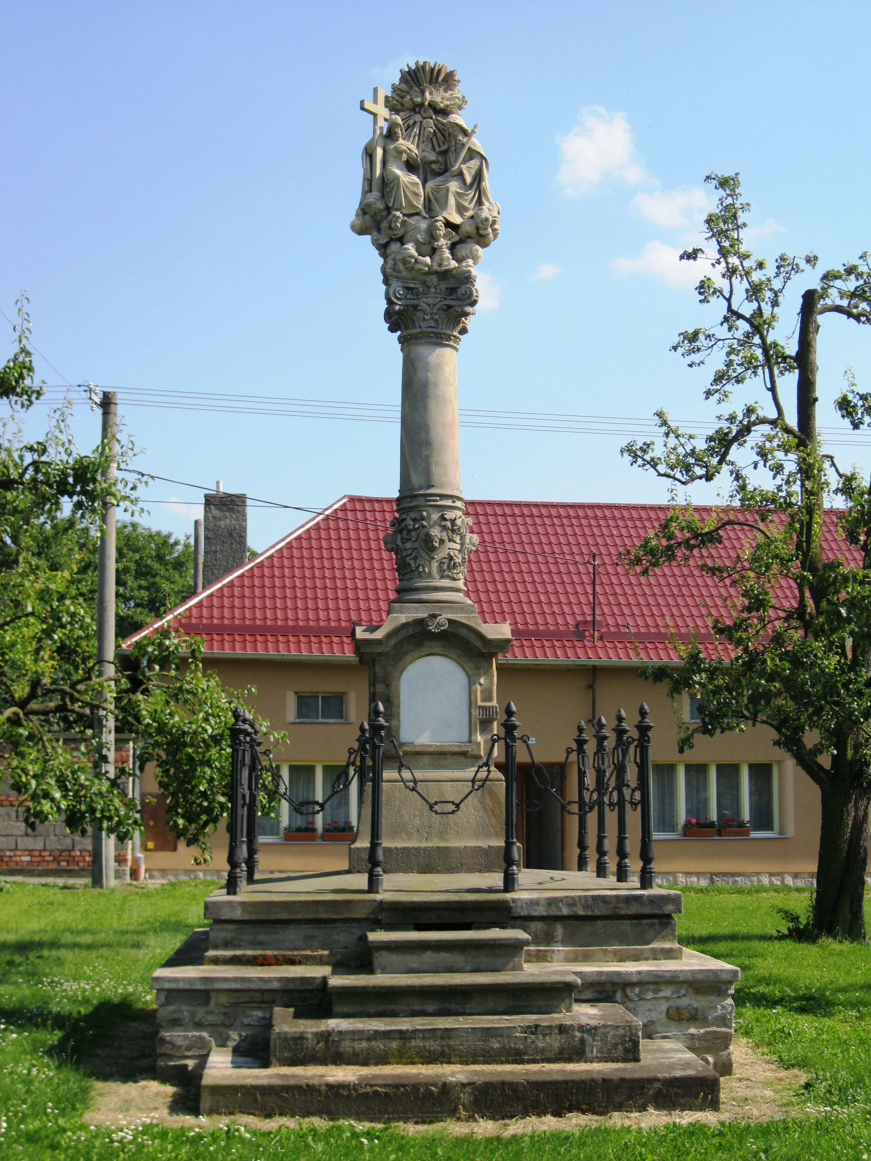 Sloup se sousoším Nejsvětější Trojice (Tovéř), u silnice do Týnečka, Tovéř